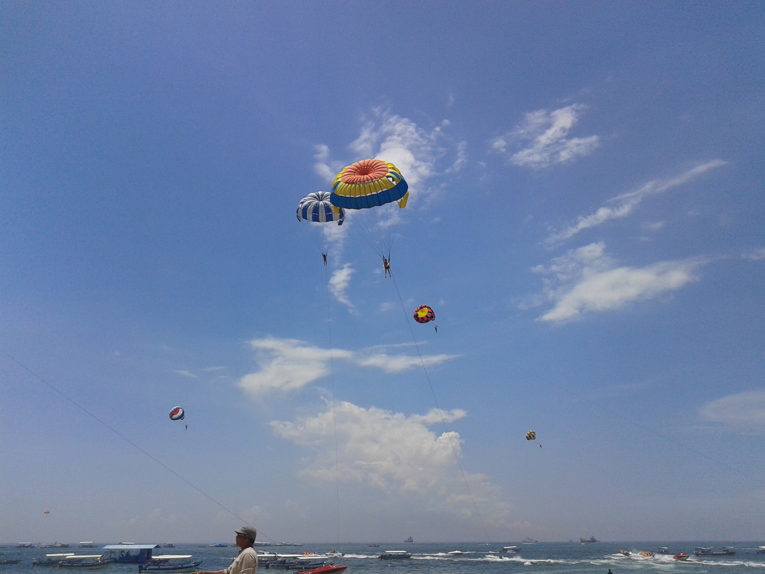 Basa Jawa: pantai ing Bali mesthi katon nyenengaké, katon éndah. Uga iku ana sing dolan paralayang ing pantai